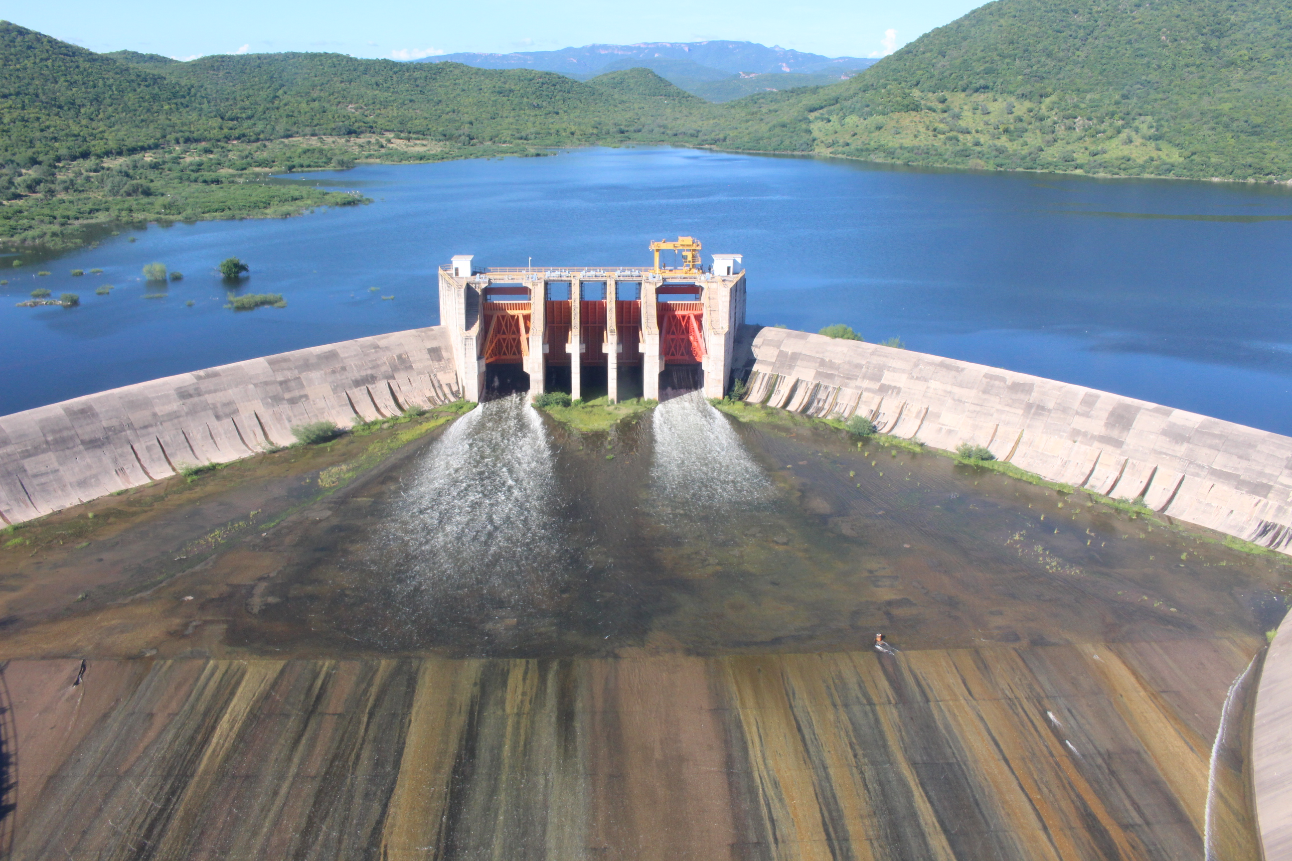 Presa Mocuzári